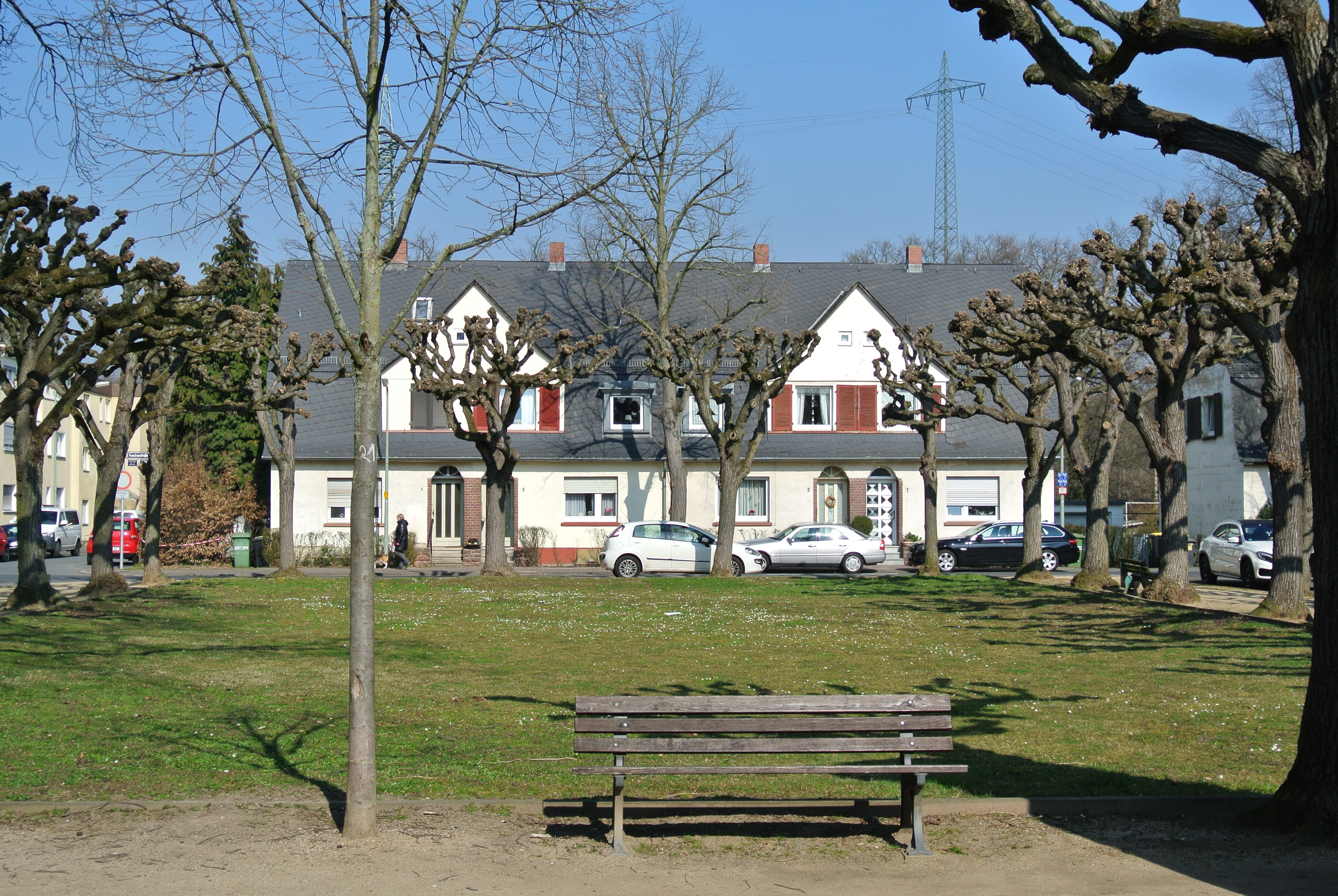 Siedlung Lindenwald (Foockenstraße) in Frankfurt-Griesheim nördlich der Mainzer Landstraße, ab 1921 errichtet, Foockenstraße 1-7